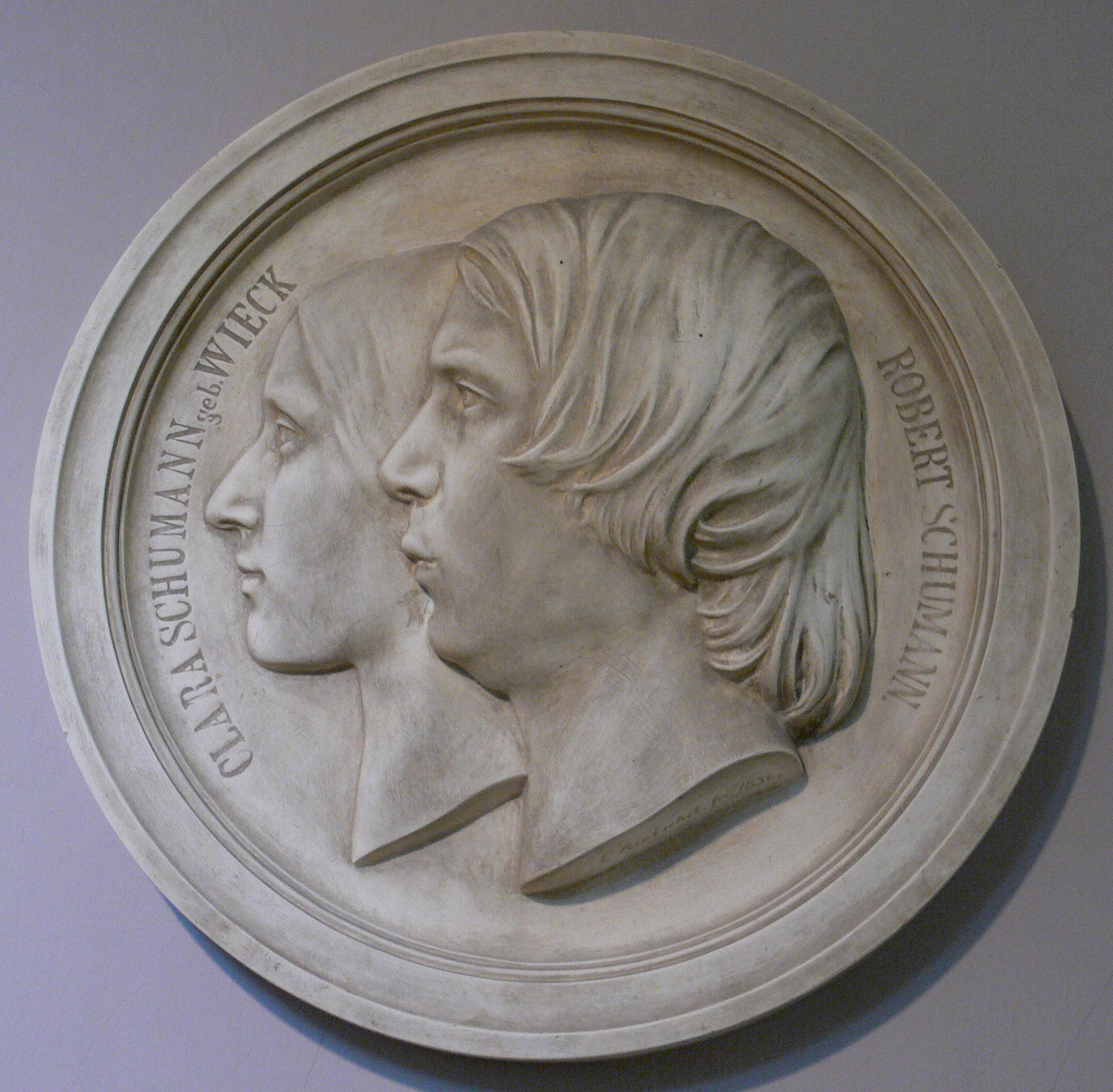 Portraitmedaillon Clara und Robert Schumann, nach Ernst Rietschel, 1846 Musikinstrumentenmuseum Berlin